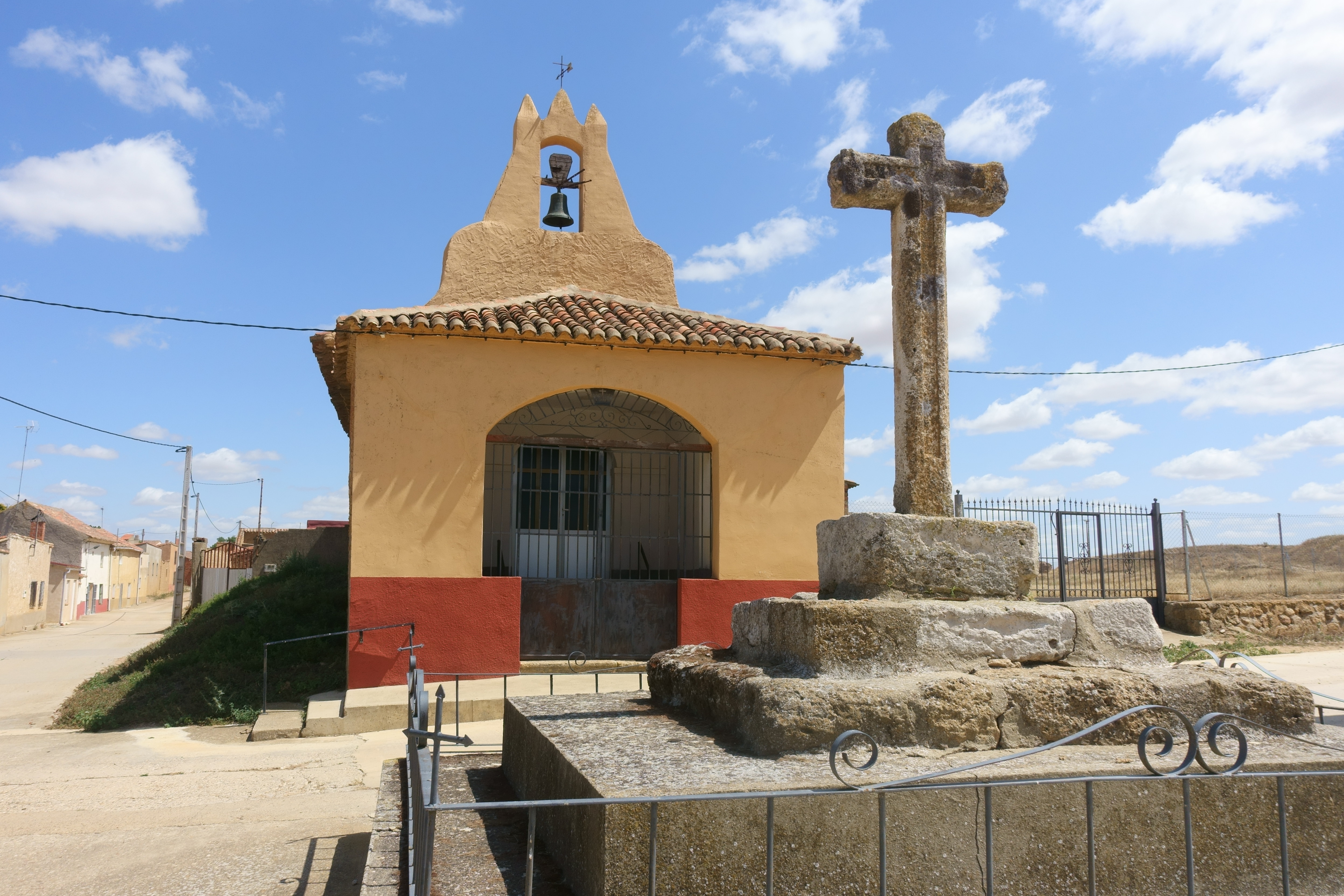 Ermita del Cristo de la Cruz, Castroverde de Campos (Zamora, España).